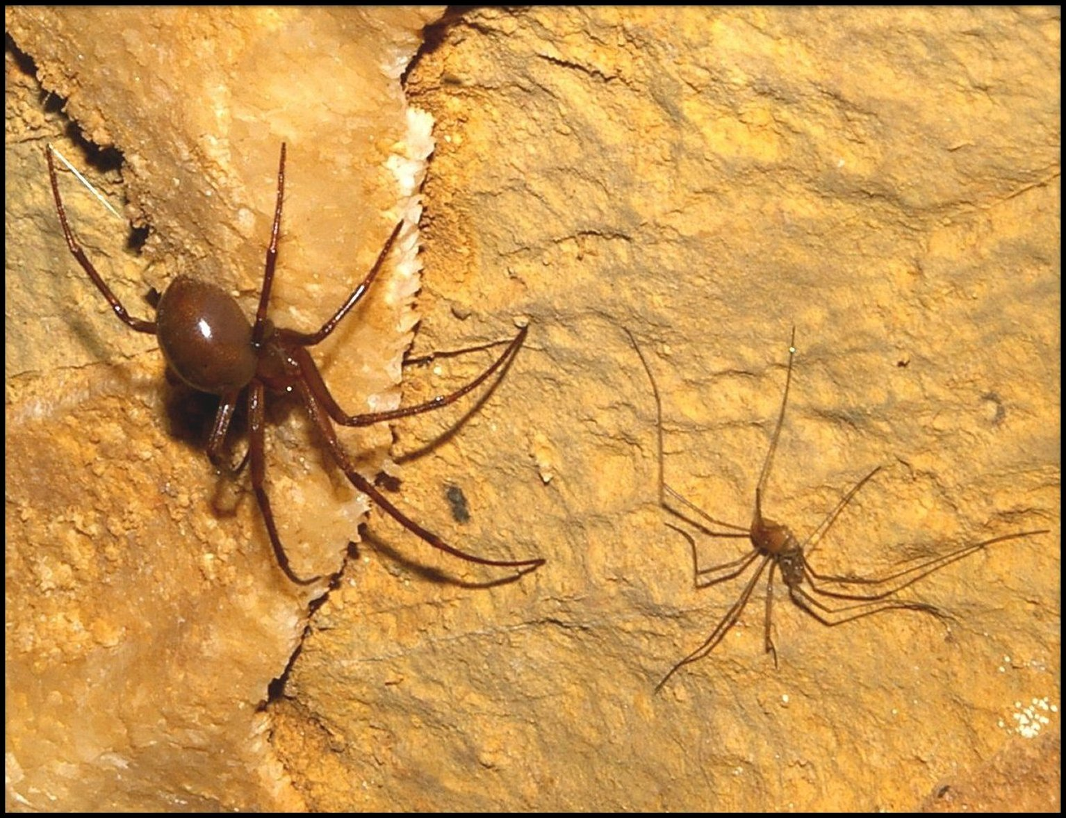 Sabacon paradoxum (à droite) près de Meta bourneti (à gauche). Grotte, ouest de l' Hérault.